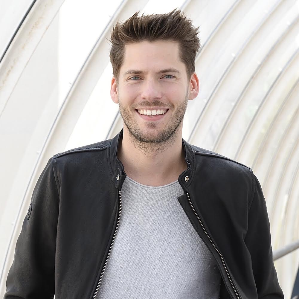 Bild von Dennis Tinat